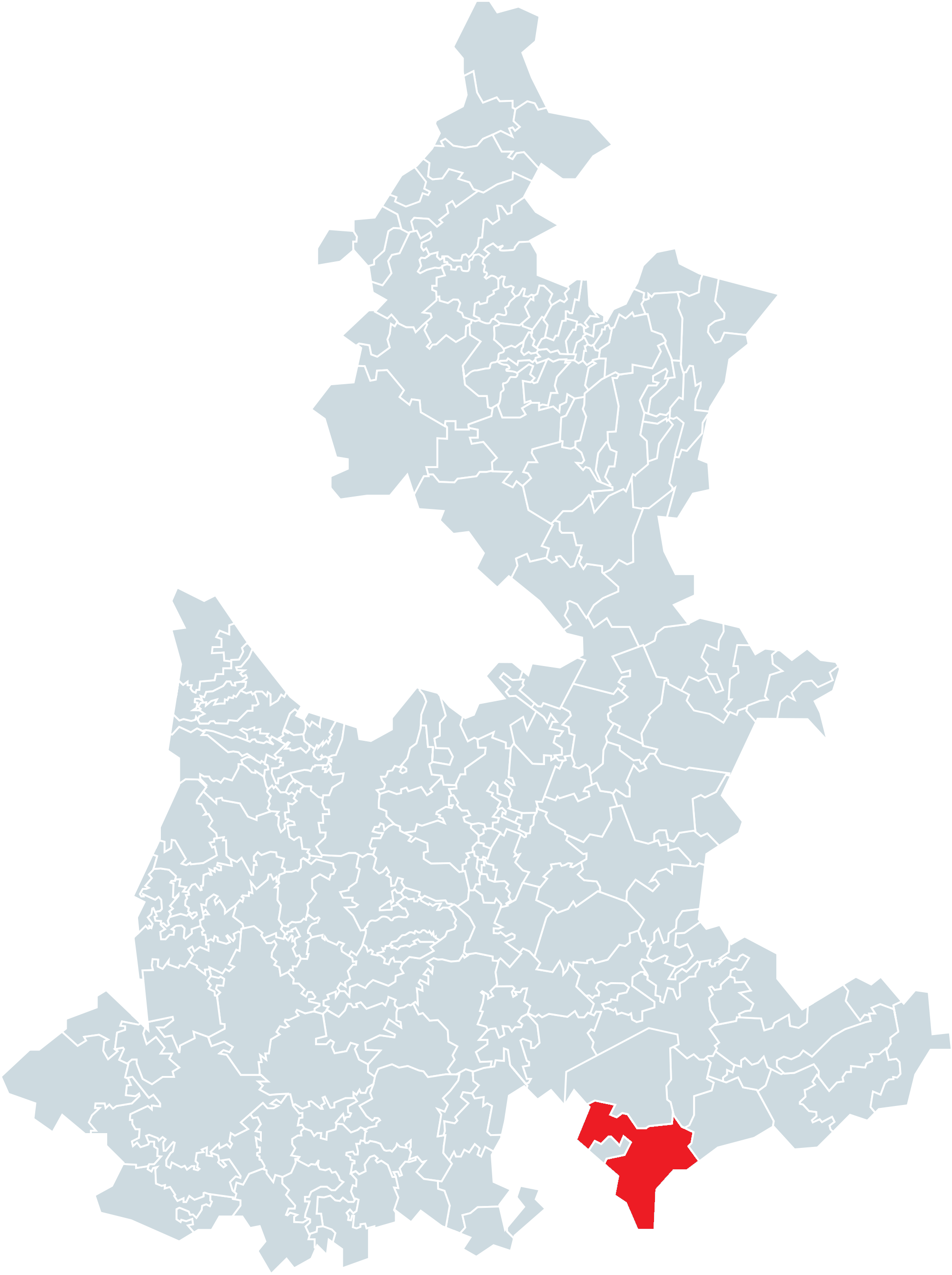 Municipio de Caltepec